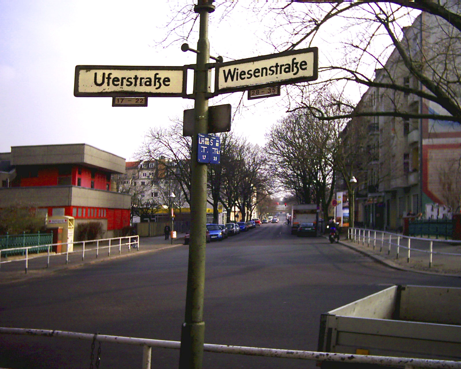 Nur noch Straßenschilder zeugen vom alten Umfeld der Panke